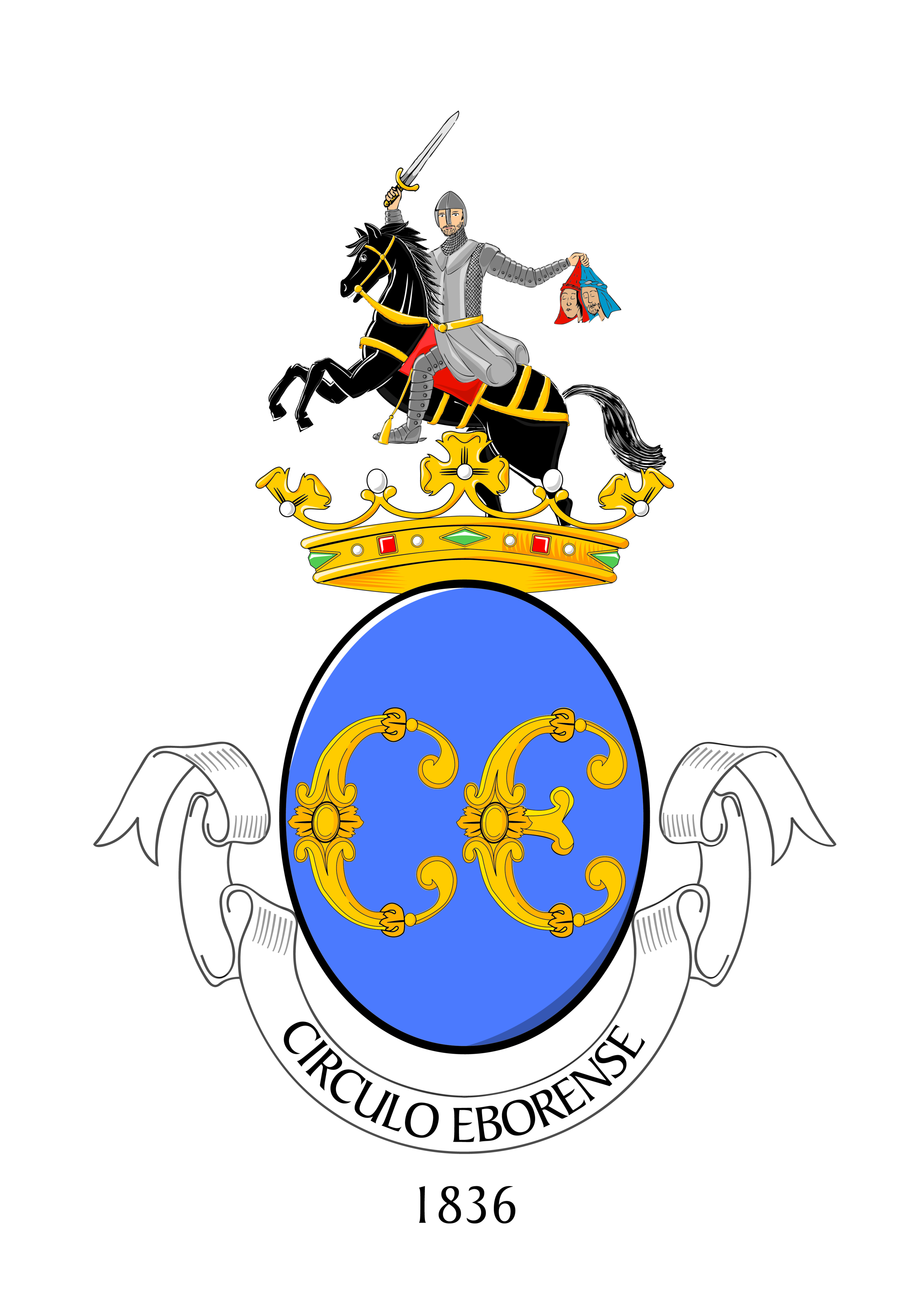 Símbolo Círculo Eborense